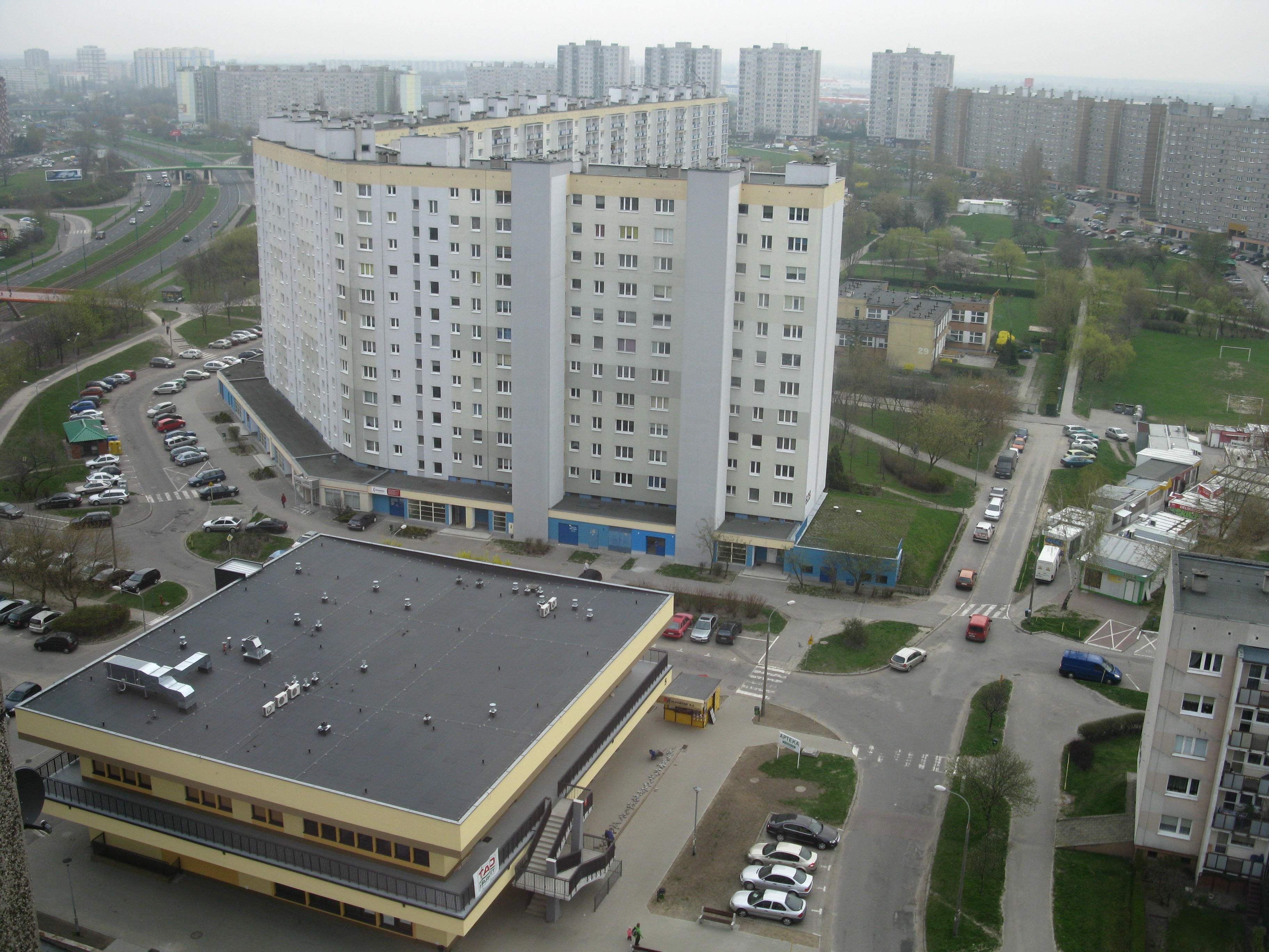 Osiedle Orła Białego w Poznaniu